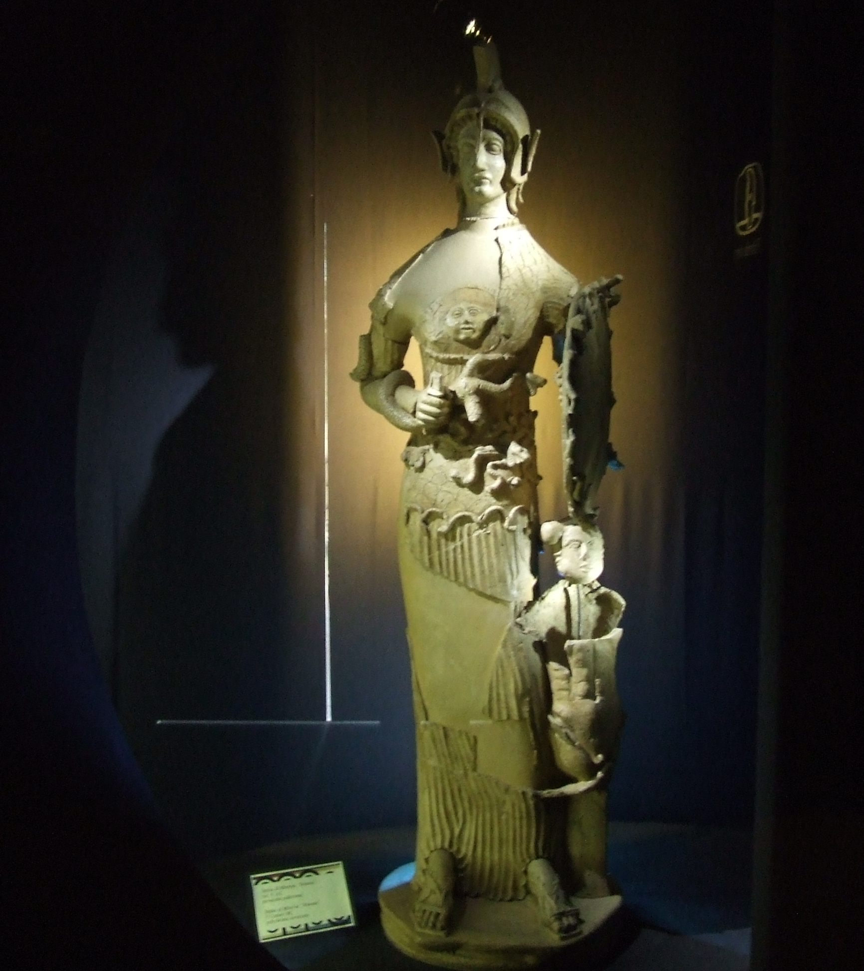 Mehrfarbige Terrakottastatue der Minerva Tritonia, 5. Jh. v. Chr. (Museo Archeologico Lavinium)